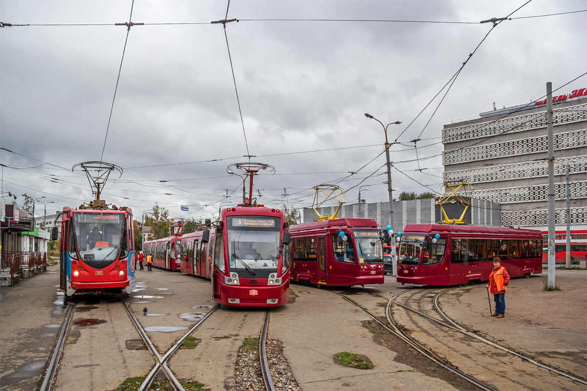 Трамваи на конечной станции Железнодорожный вокзал в Казани. Слева Направо — ЛМ-99АЭ, АКСМ-843, два КТМ-23.